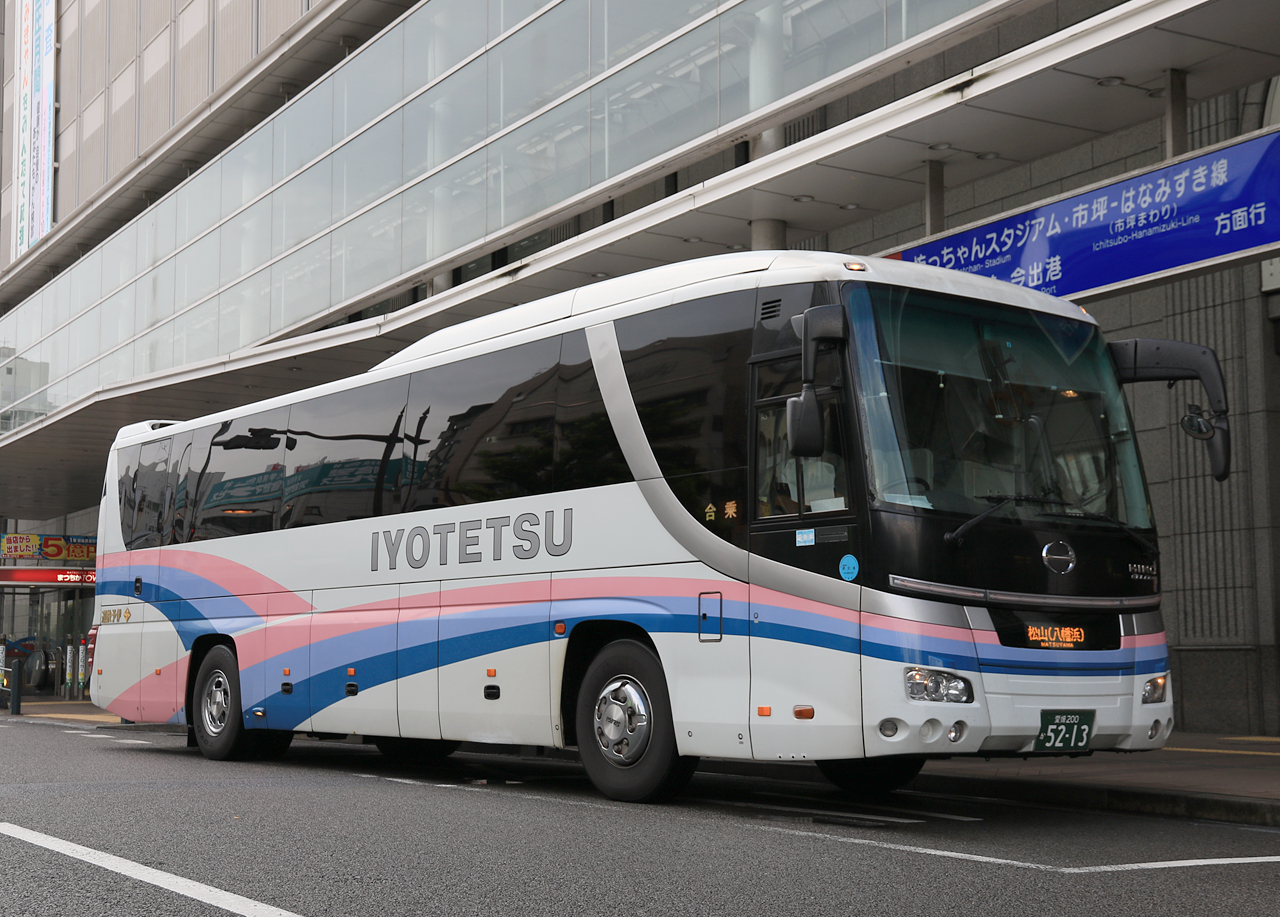 登録番号 愛媛200か52-13 伊予鉄道㈱松山室町営業所所属（伊予鉄南予バス八幡浜本社駐在） 夜行高速路線用車両 2015年9月17日 伊予鉄松山市駅にて撮影 撮影者 Zondag2000